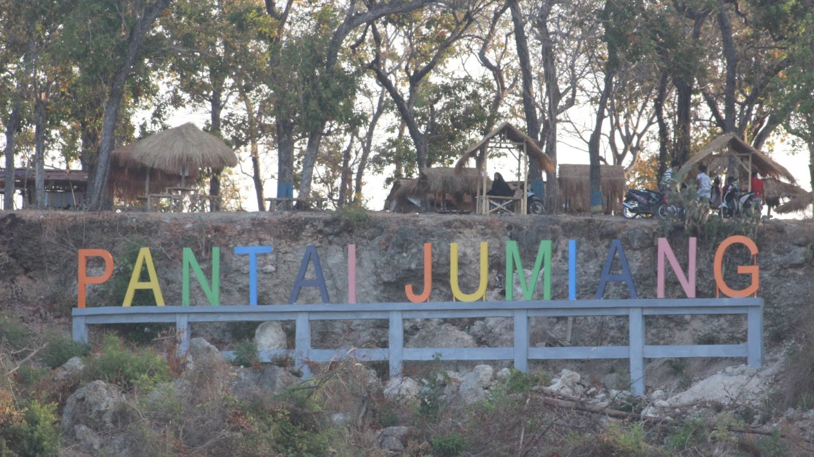 Salah Satu Wisata Di Desa Tanjung yaitu Pantai Jumiang